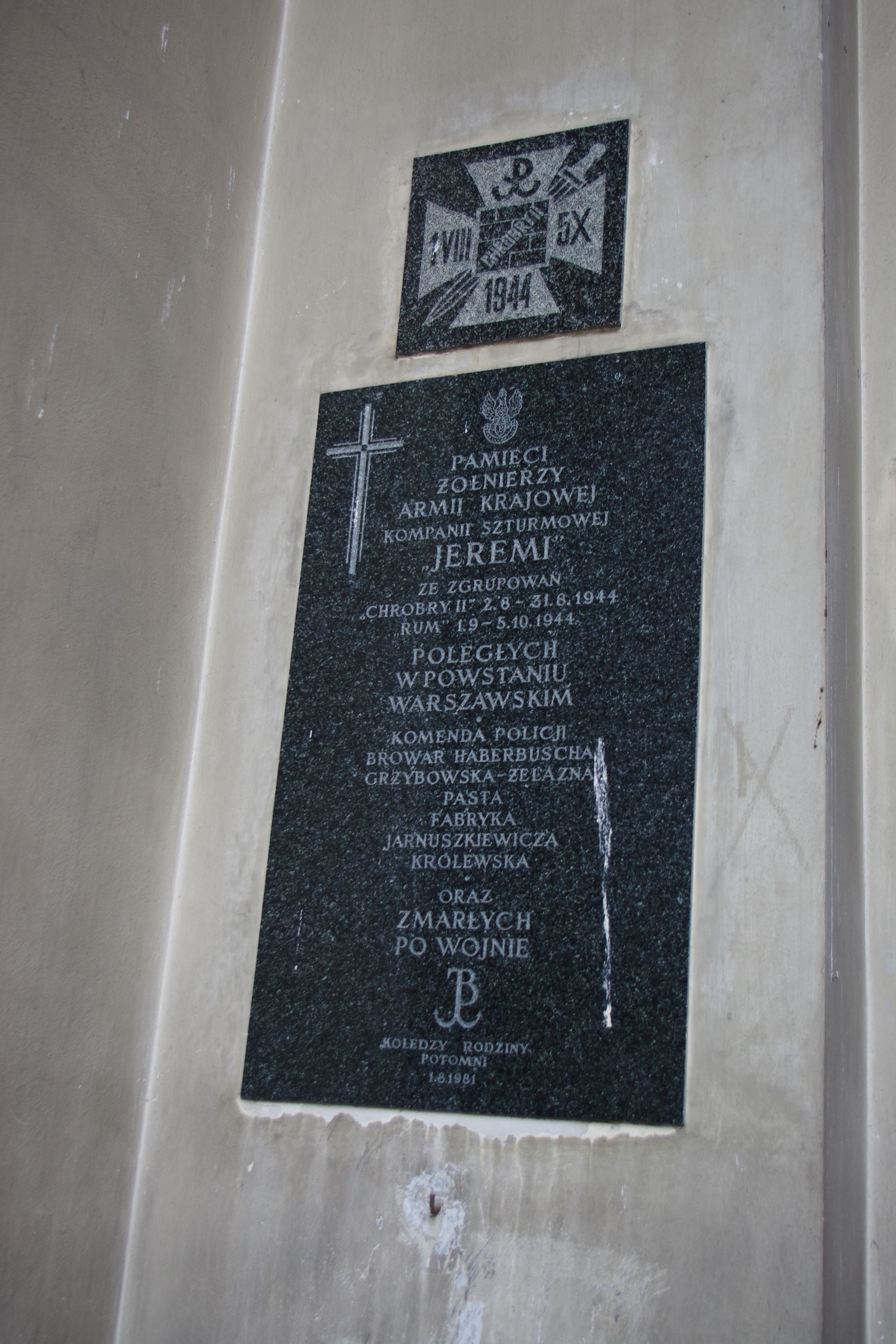 Tablica upamiętniająca żołnierzy 6 kompanii ”Jeremi”- Zgrupowania Chrobry II na Kościele Wszystkich Świętych w Warszawie